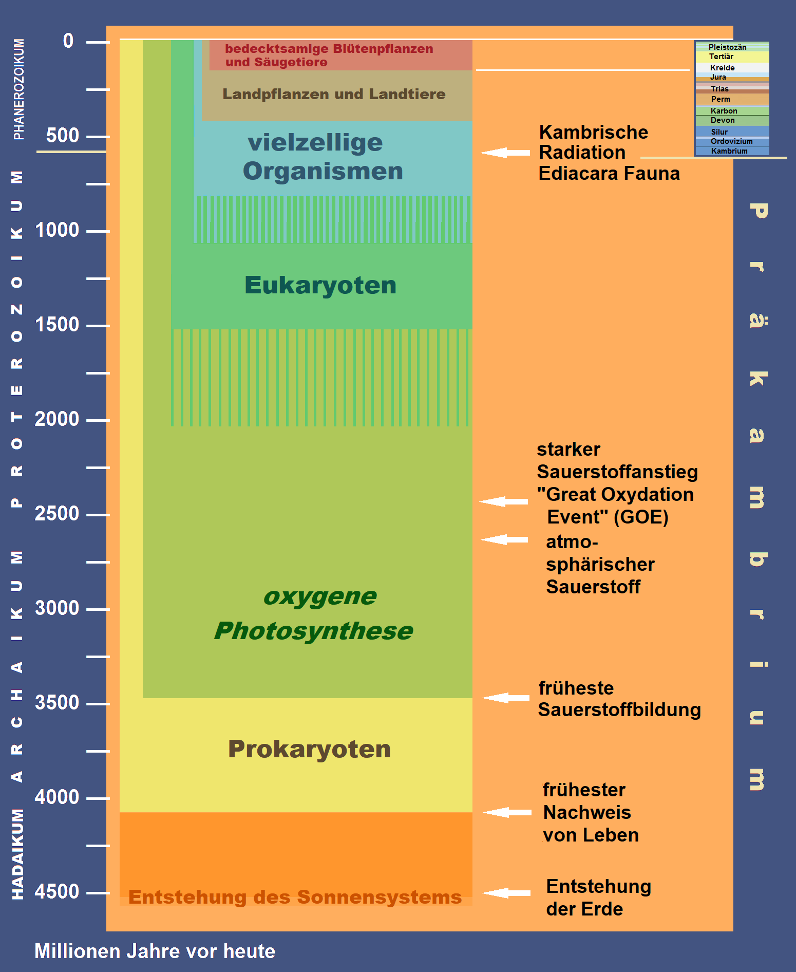 Evolution der Lebewesen